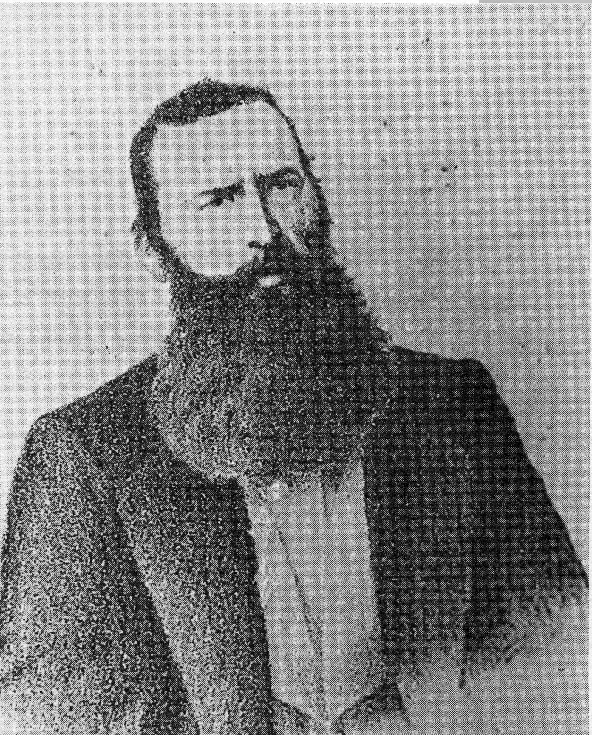 immagine del patriota garibaldino e poeta Giovanni Battista Sicheri di Stenico